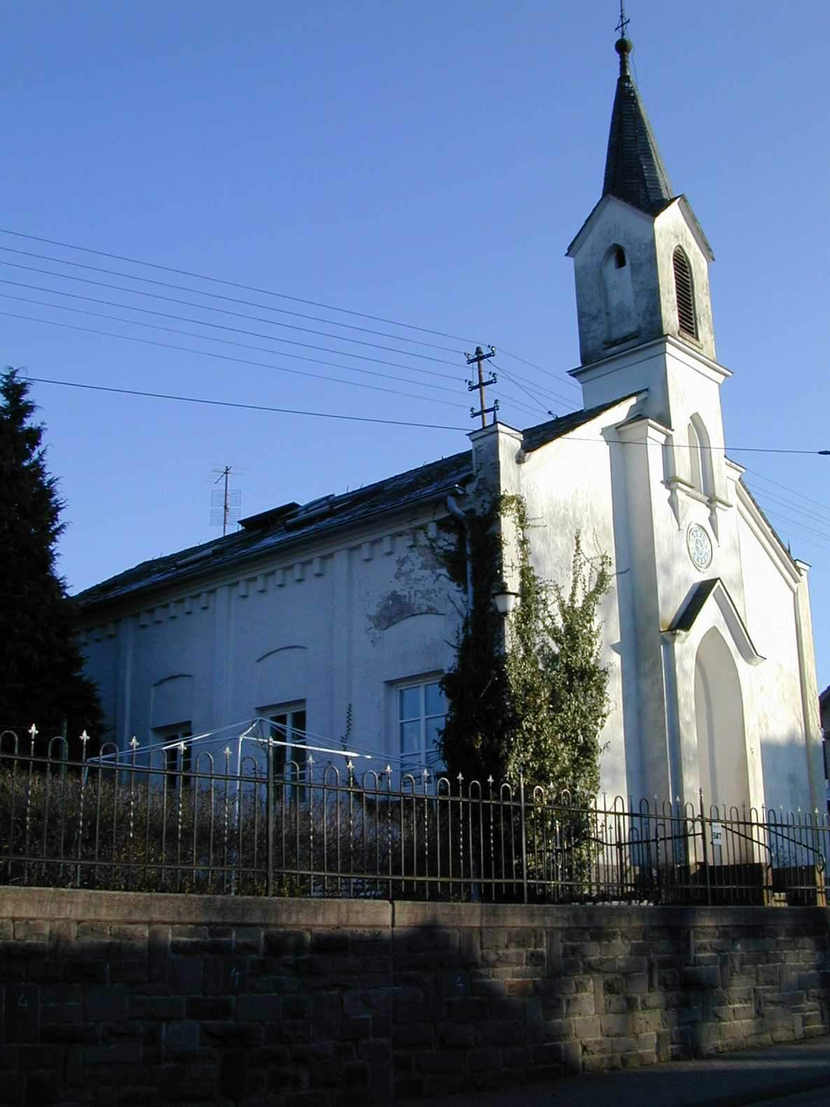 Alte Kapellenschule in Kreuztal-Kredenbach